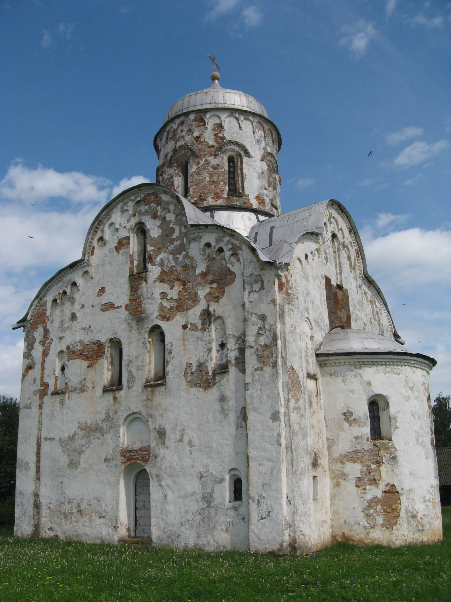 Церковь Николы на Липне. 1292 год.